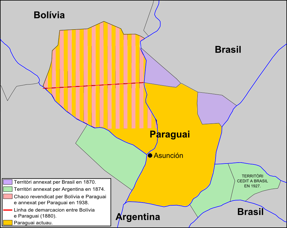 Evolucion territòriala de Paraguai.